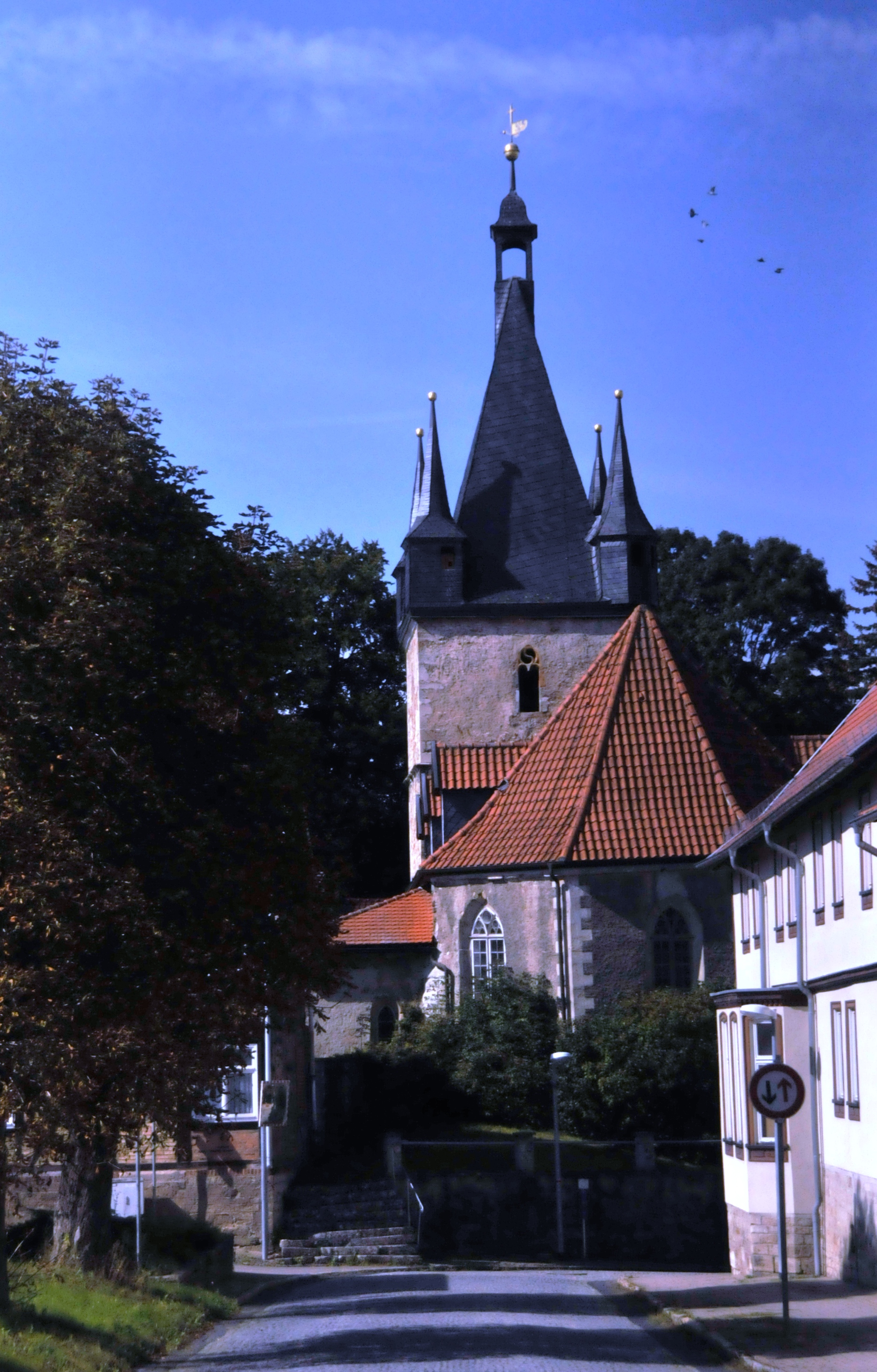 Ebeleben, Kirche St. Bartolomäus